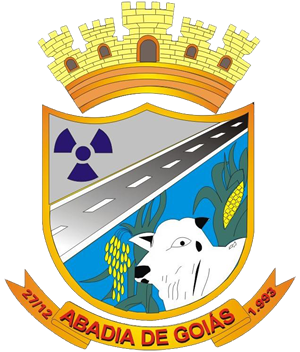 Brasão de Abadia de Goiás, Brasil.